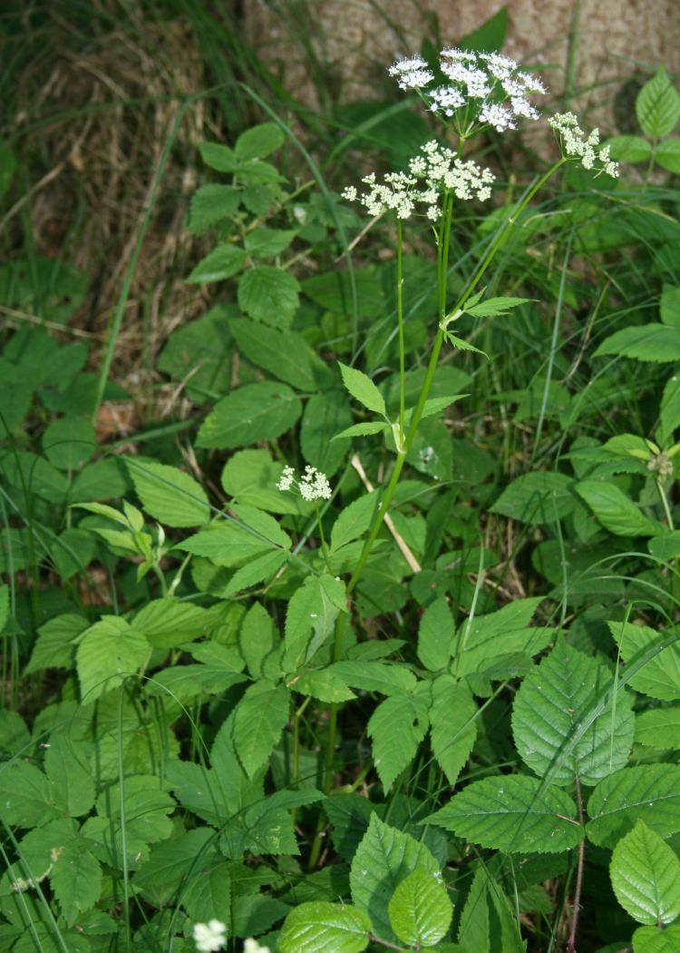 Geißfuß (Aegopodium podagraria), Doldenblütler (Apiaceae) - Österreich/Austria/Autriche: Oberösterreich, Hausruckviertel, Kien NW Attnang-Puchheim